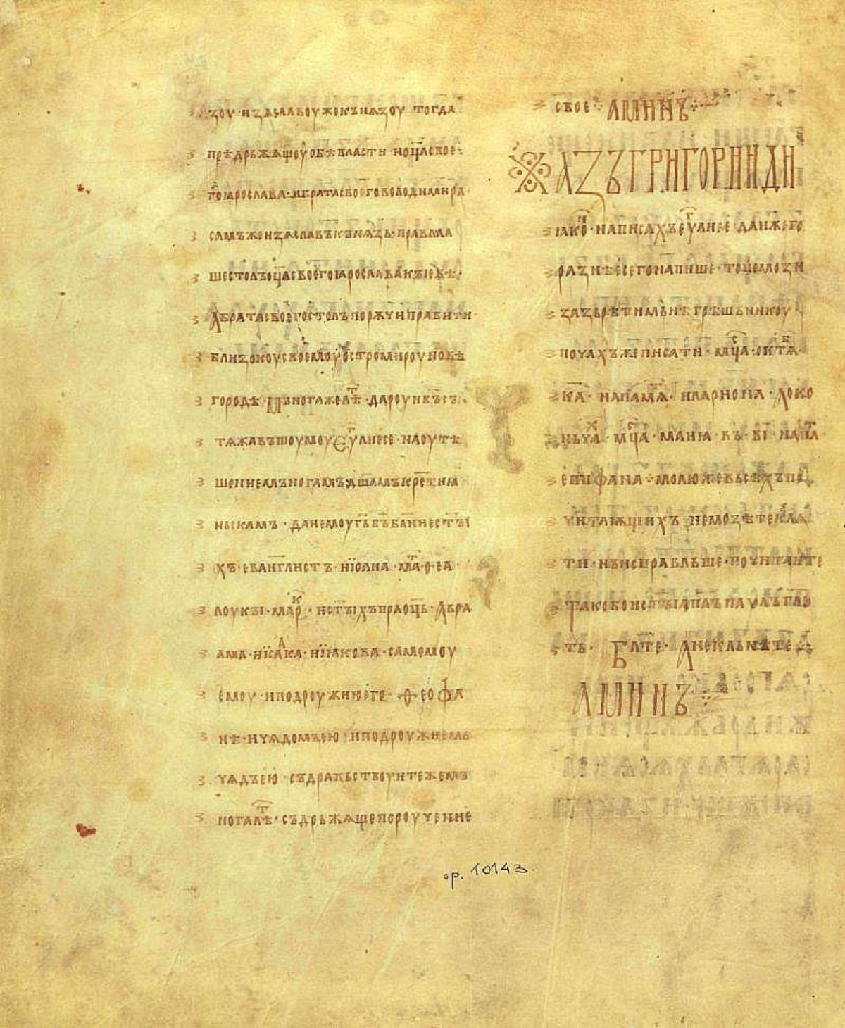 Остання сторінка Остромирового Євангелія із записом дяка Григорія